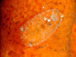 Thordisa sanguinea, a 26 m, en el Parque Marino de Izu, Japón